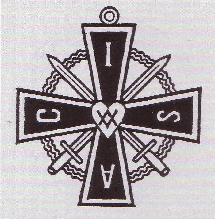 Symbol des Amicistenordens